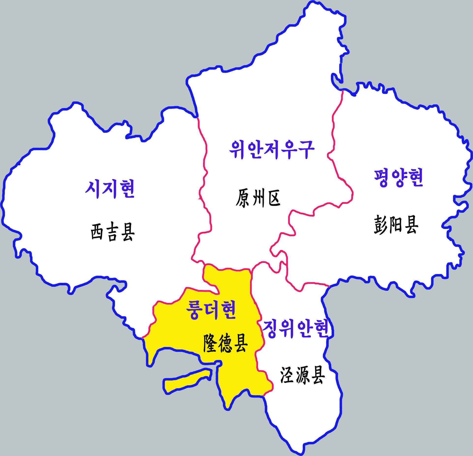 구위안시 현급구역도